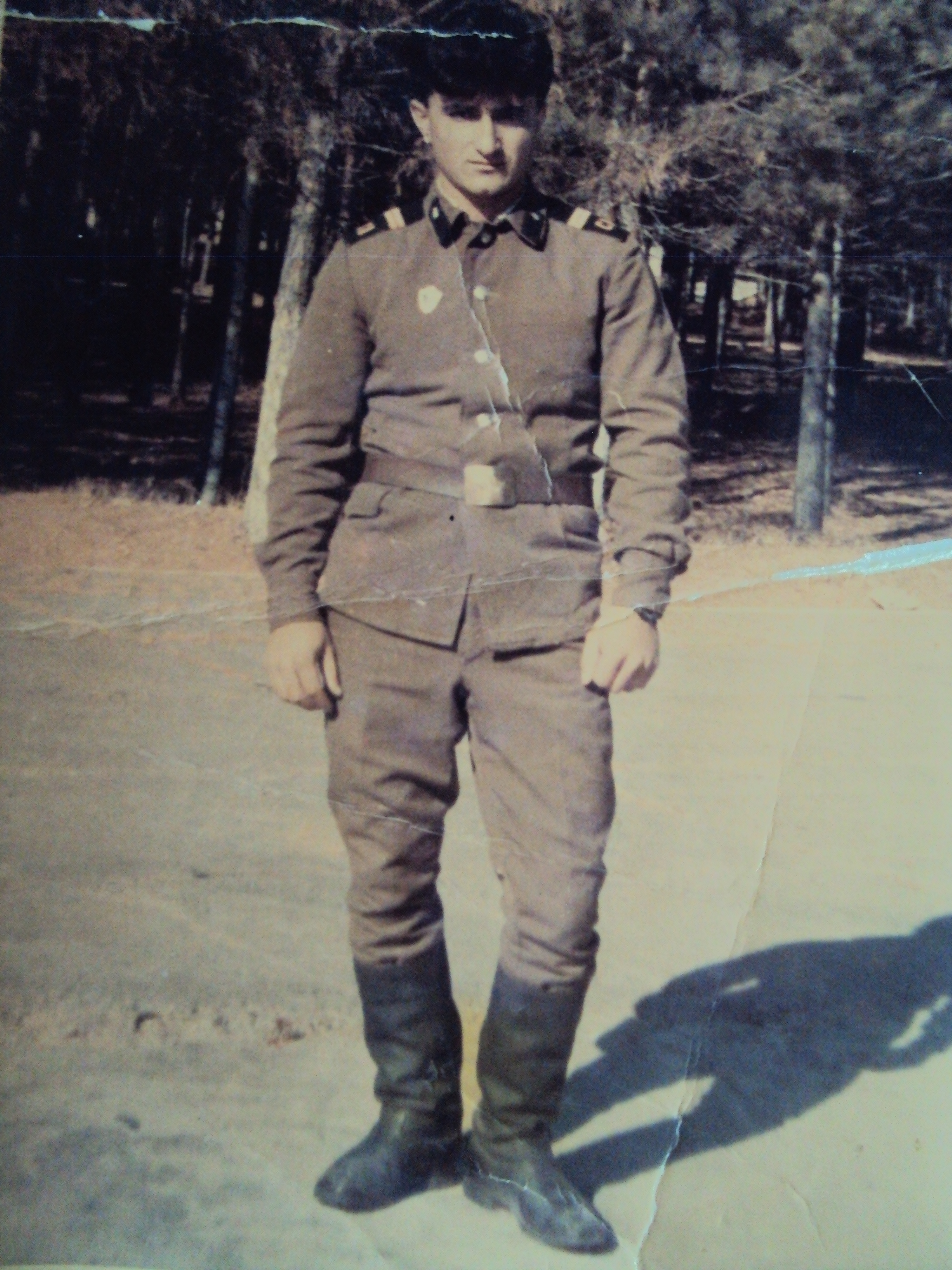 Սևակ Ղուկասյանը Խորհրդային բանակում ծառայության տարիներին